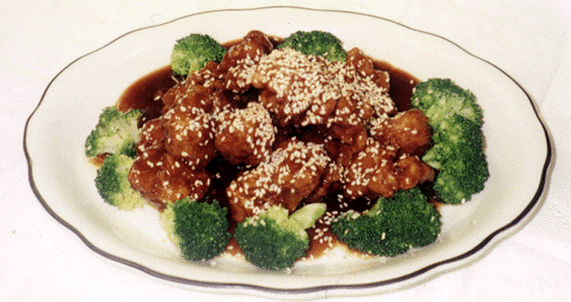 Sesame Chicken